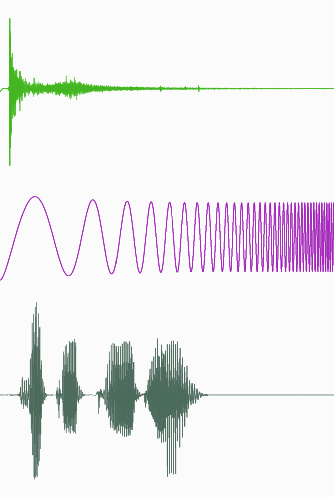 Optische Darstellung des Schalls als Wellenform.